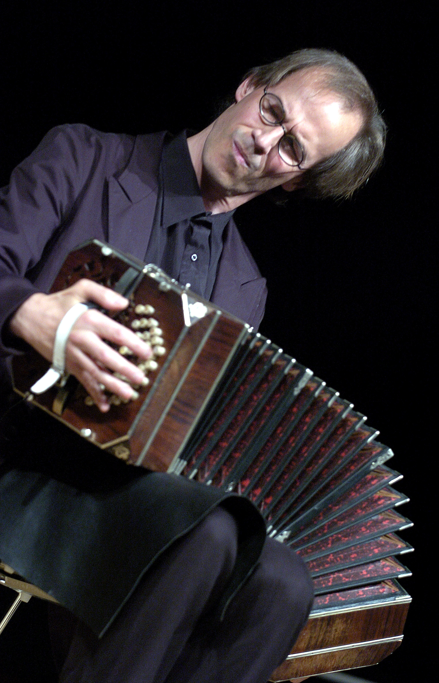 Portrett